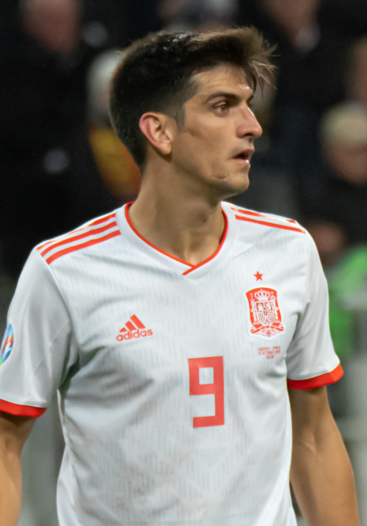 UEFA EURO qualifiers Sweden vs Spain 20191015